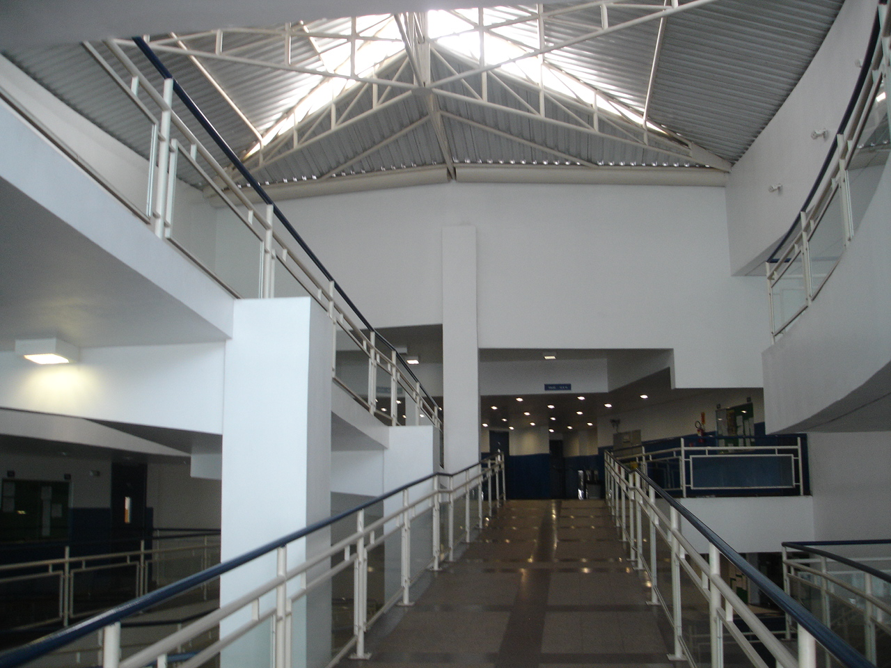 Interior da Faculdade de Direito, com rampas de acesso às salas de aula